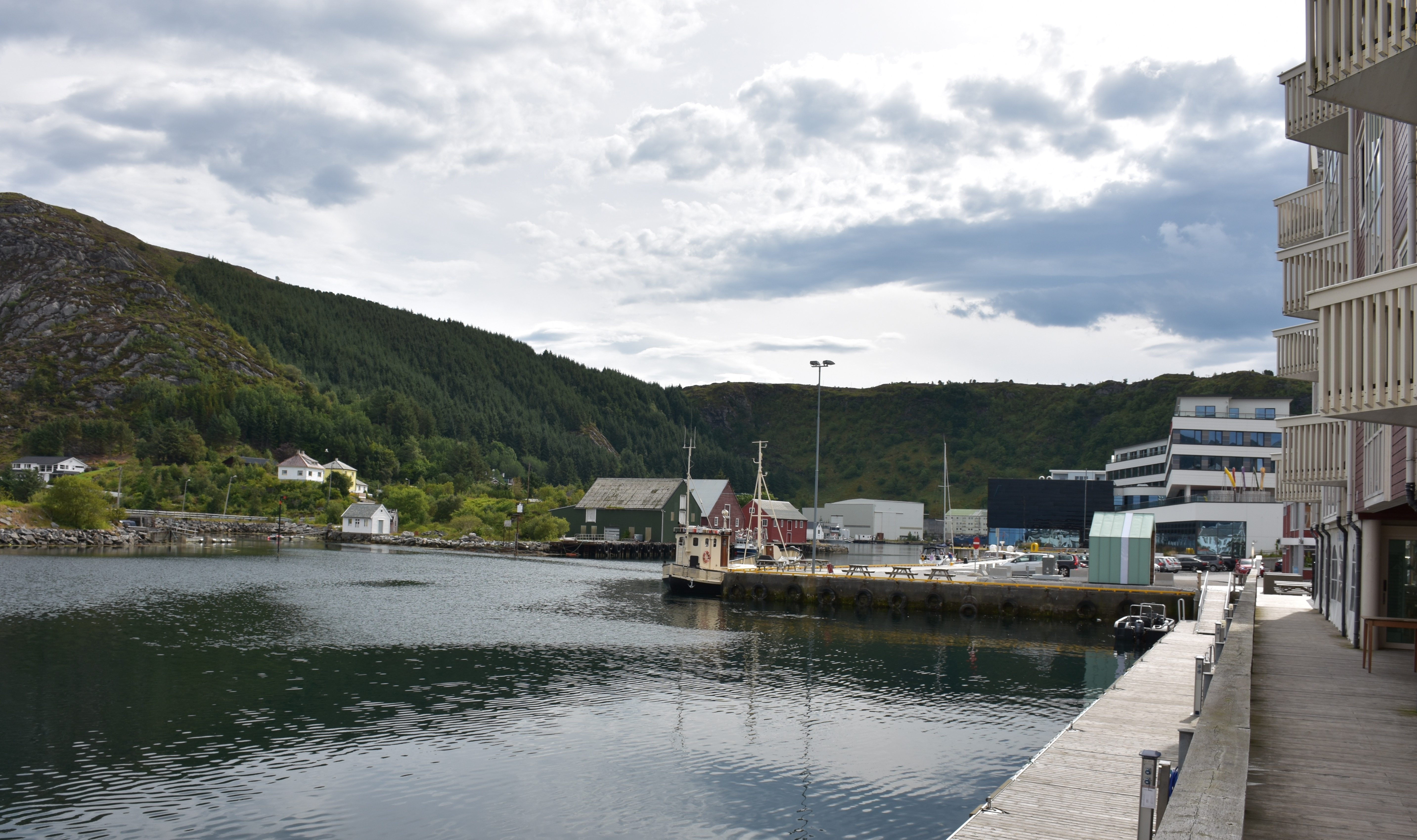 Fra havneområdet i Fosnavåg